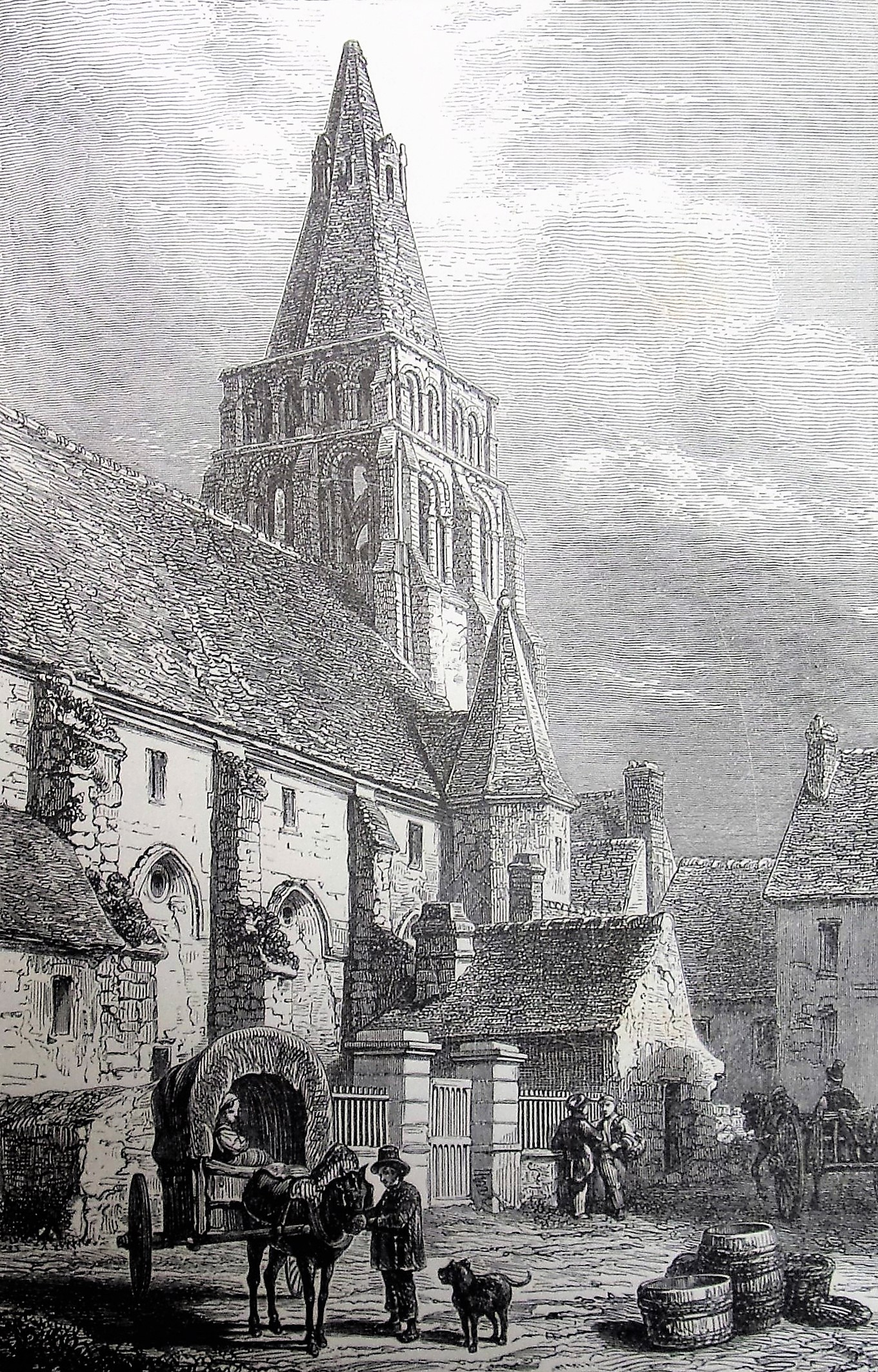 Lithographie de l'abbaye de Cormery vers 1869